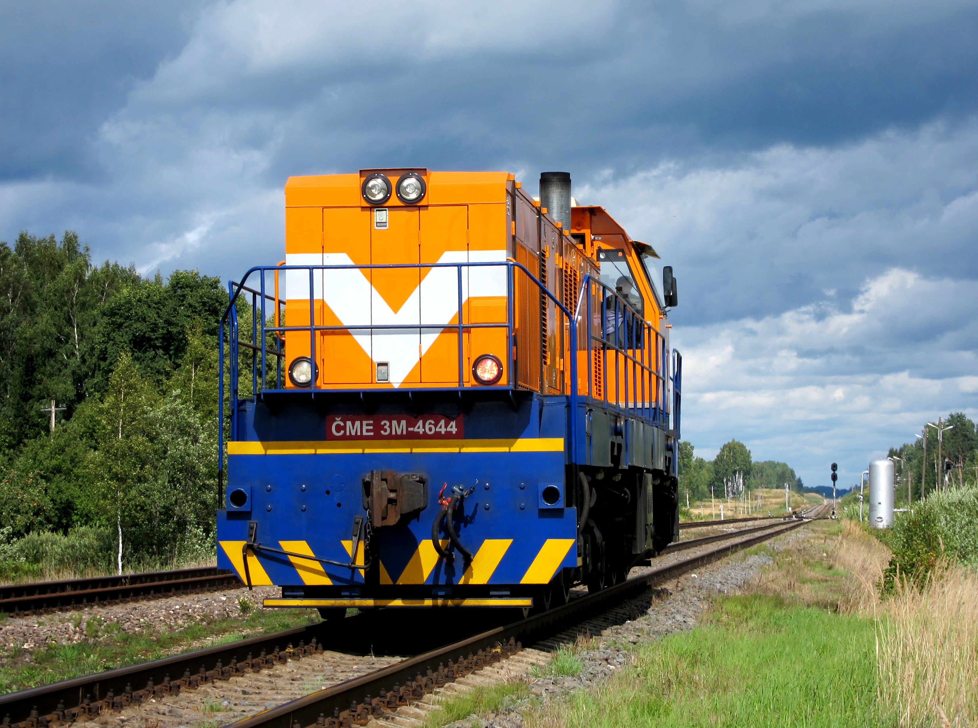 Manevru lokomotīve ČME3M-4644 no Aglonas stacijas dodas Rēzeknes virzienā